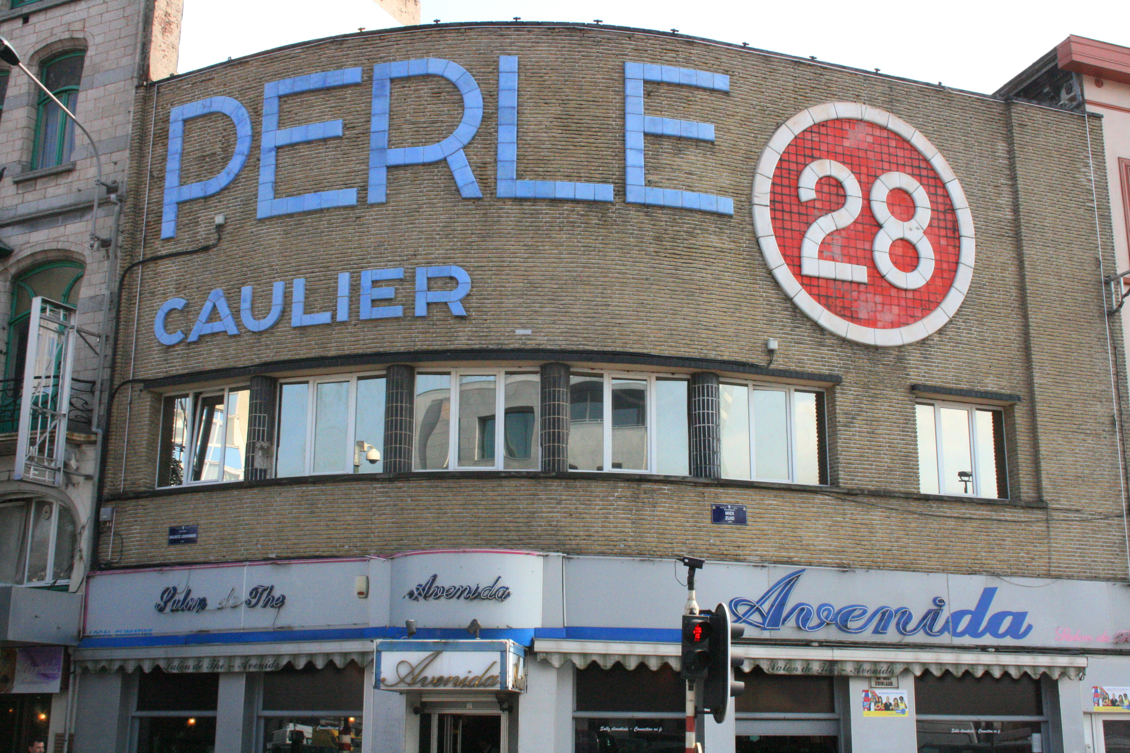 Boulevard Maurice Lemonnier 218, Bruxelles, Belgique. Ancienne brasserie Express-Midi (1934)